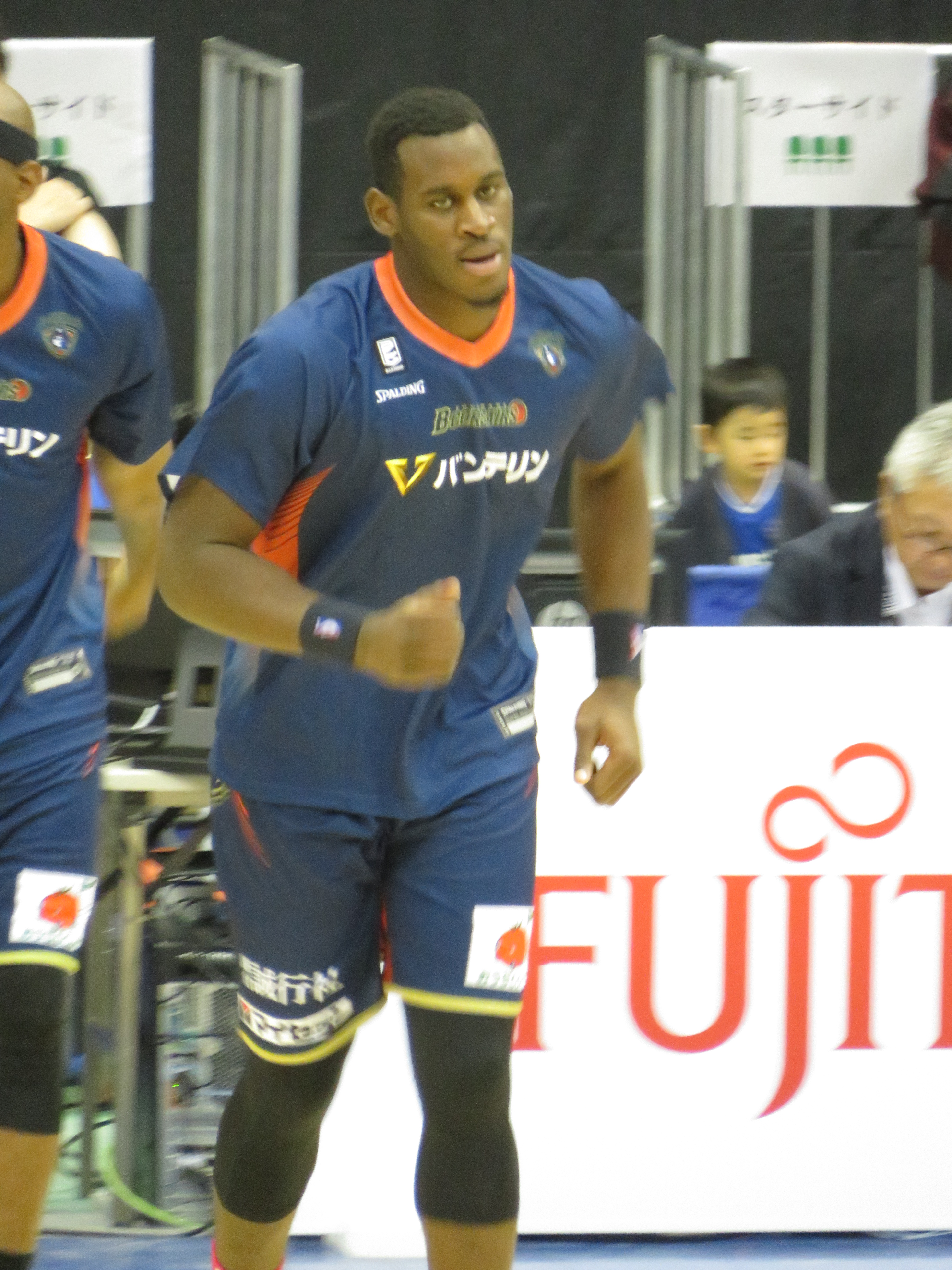 2018年 10月20日 2018-19 B1 第三節 横浜-滋賀 横浜国際プール